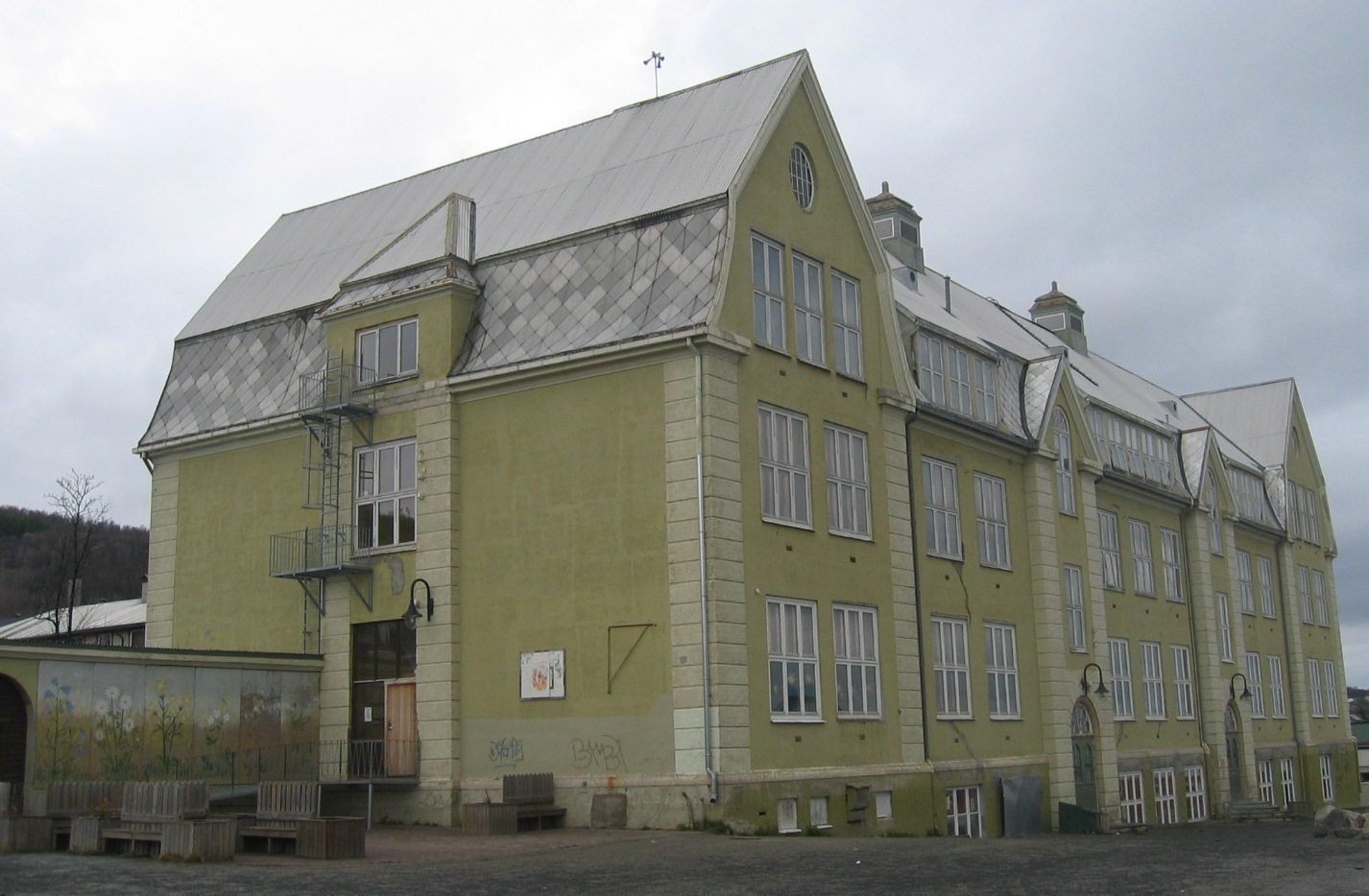 Harstad barneskole (tidligere Harstad folkeskole)